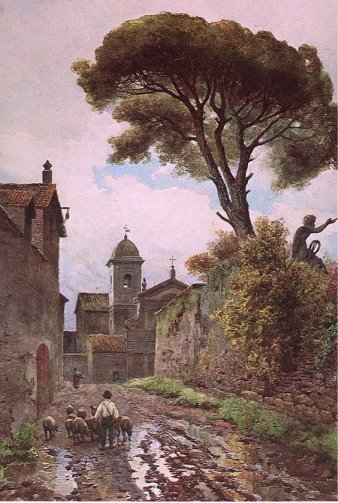 Vicolo di San Nicola da Tolentino in Rome (rione Trevi)